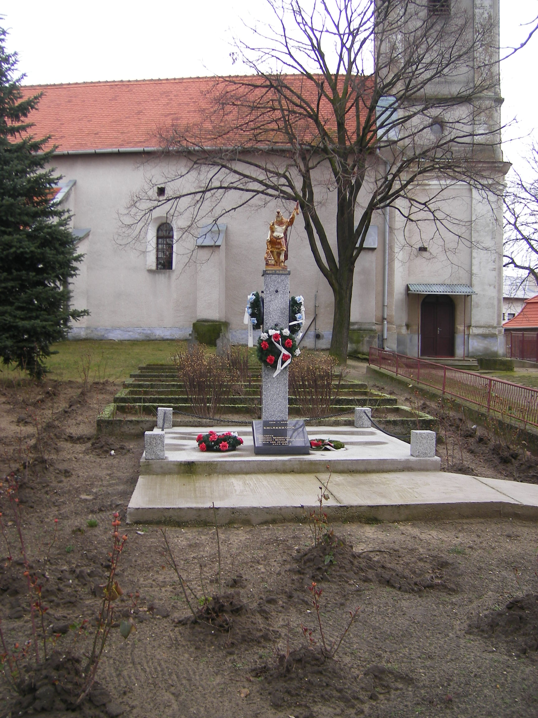 Marcelháza - Szent Flóriáns szobra, háttérben a katolikus templommal